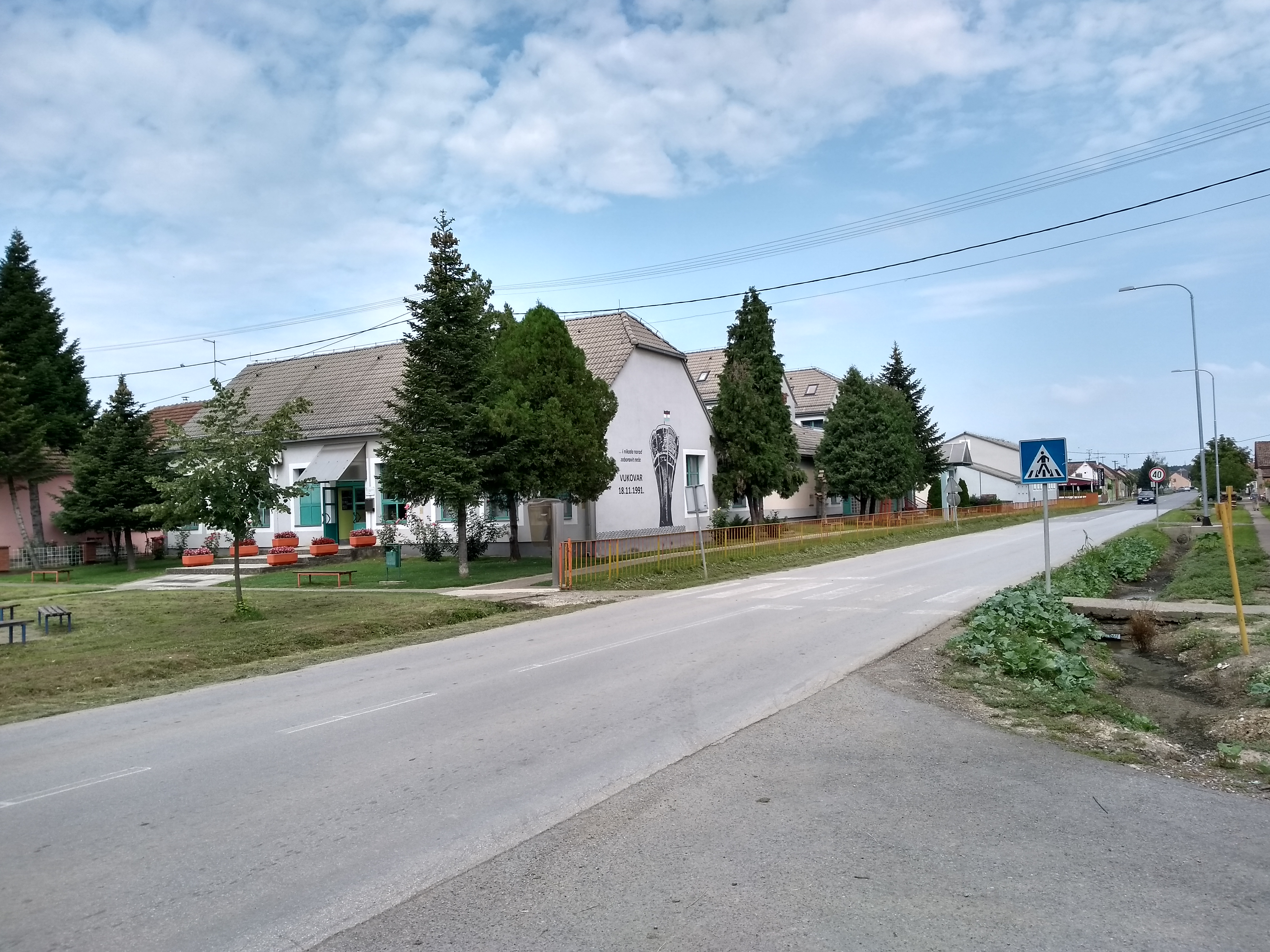 Osnovna škola Budrovci